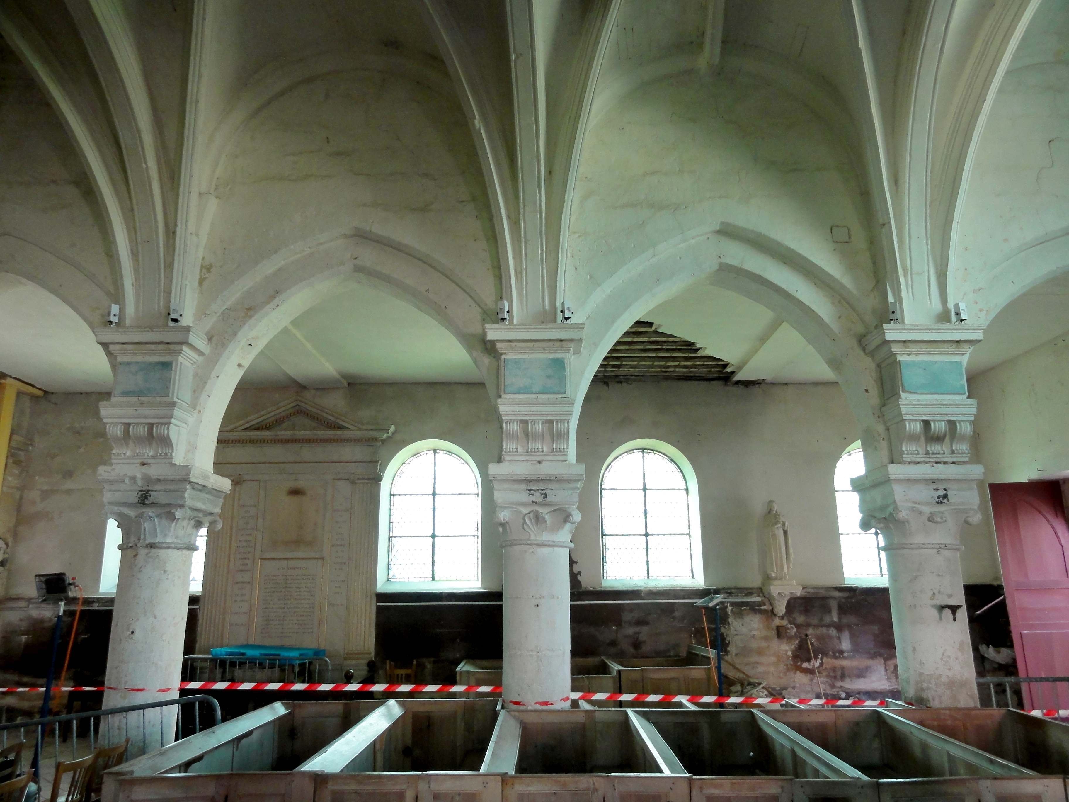 Intérieur de l'église (voir titre).